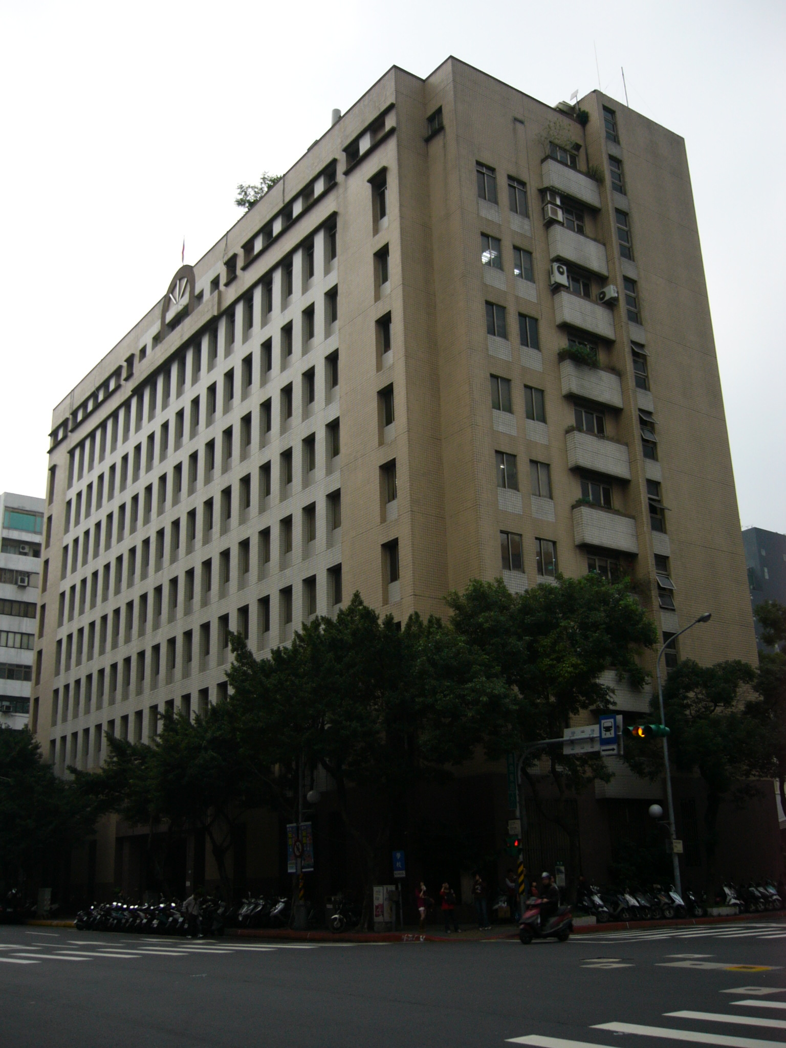 行政院衛生署疾病管制局大樓，地址：臺北市中正區林森南路6號。